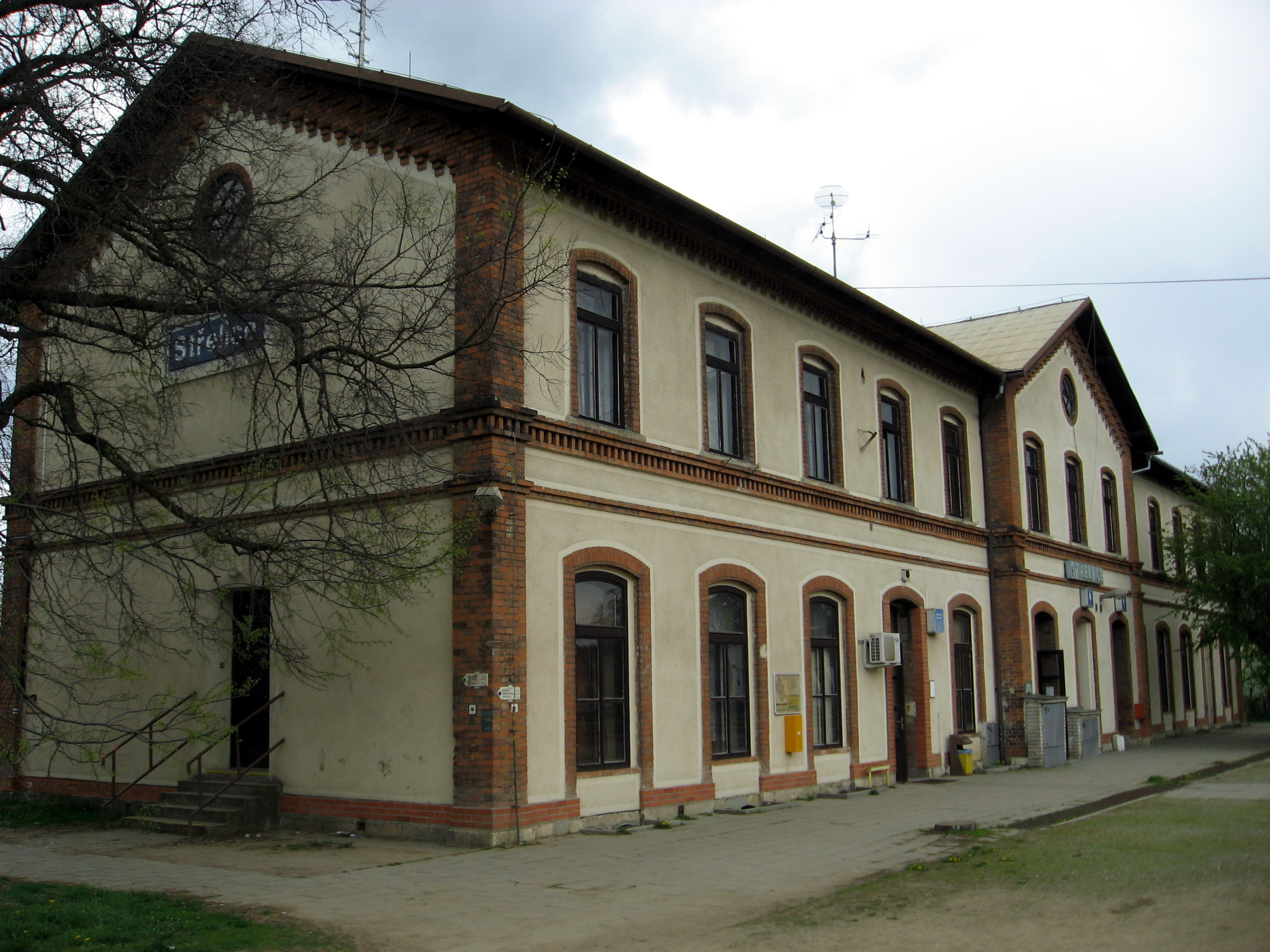 Střelice, nádraží